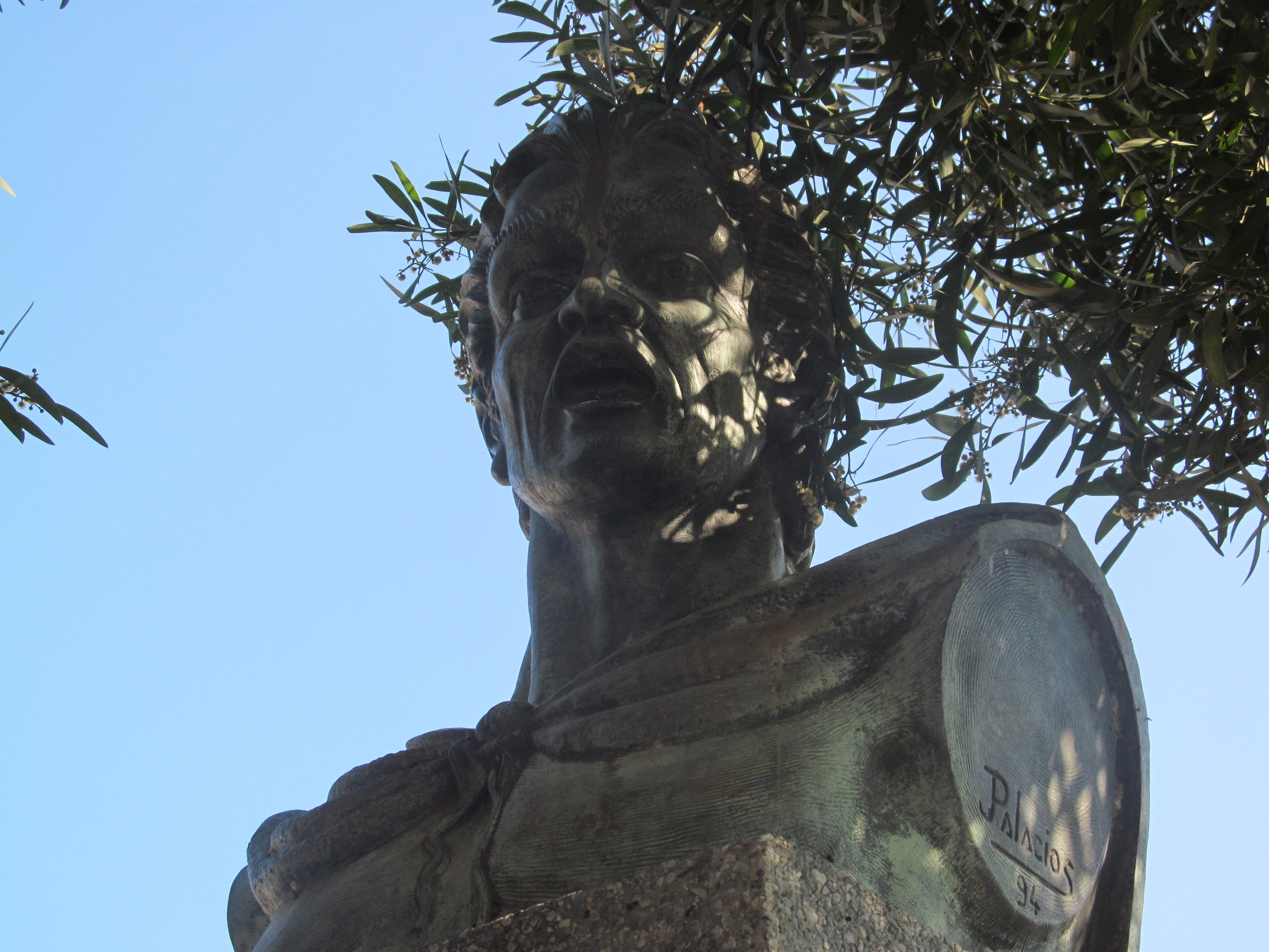 Obra del escultor Jorge Isaac Palacios.